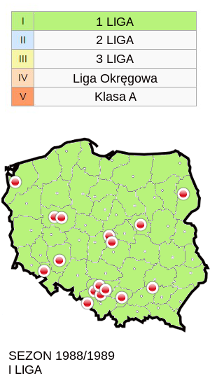 Jagiellonia w sezonie 1988/89 mapa